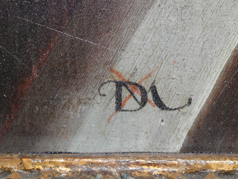 Signatur des Feldkircher Malers Dietrich Meuss